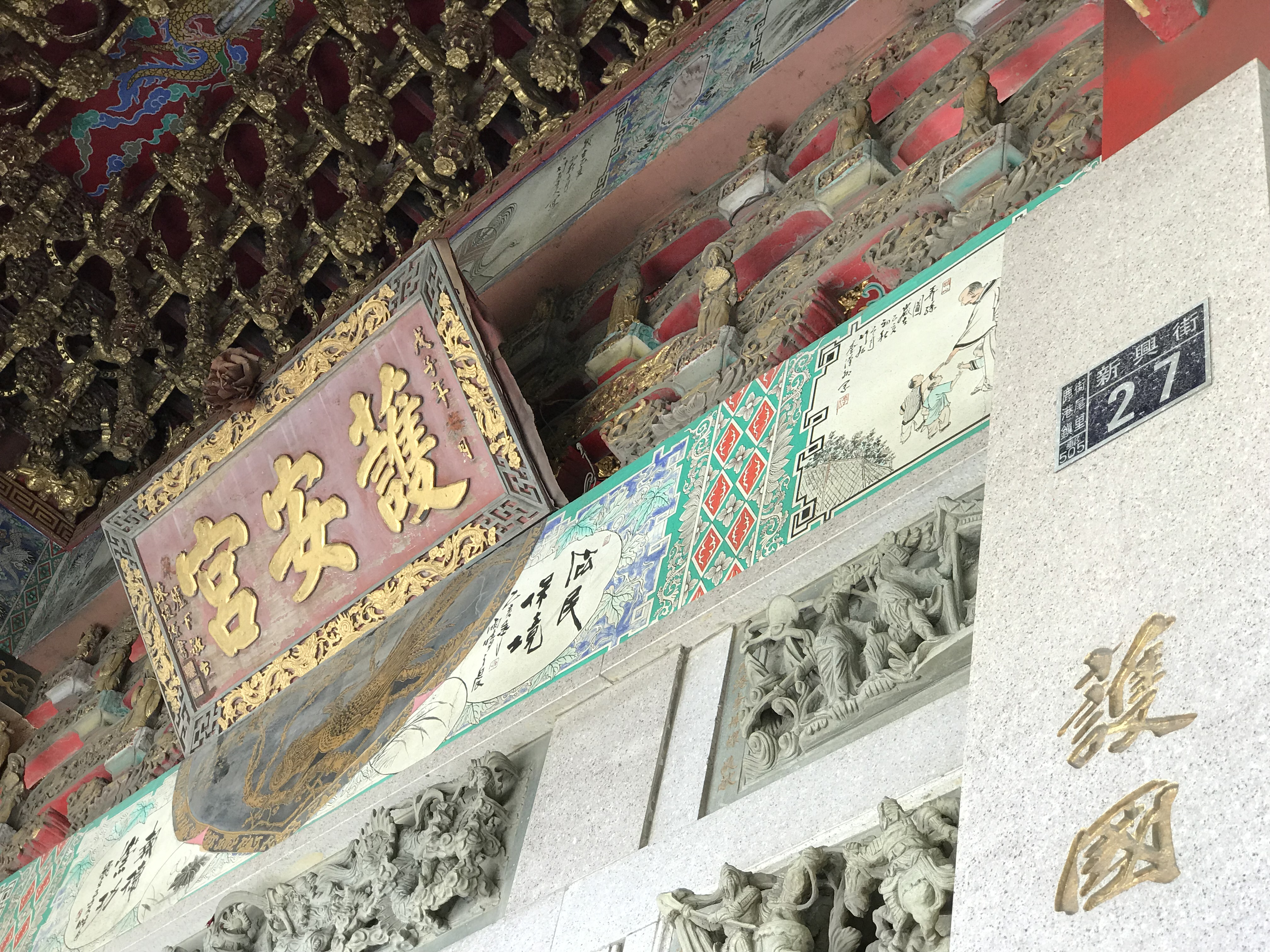 鹿港護安宮廟匾與門牌